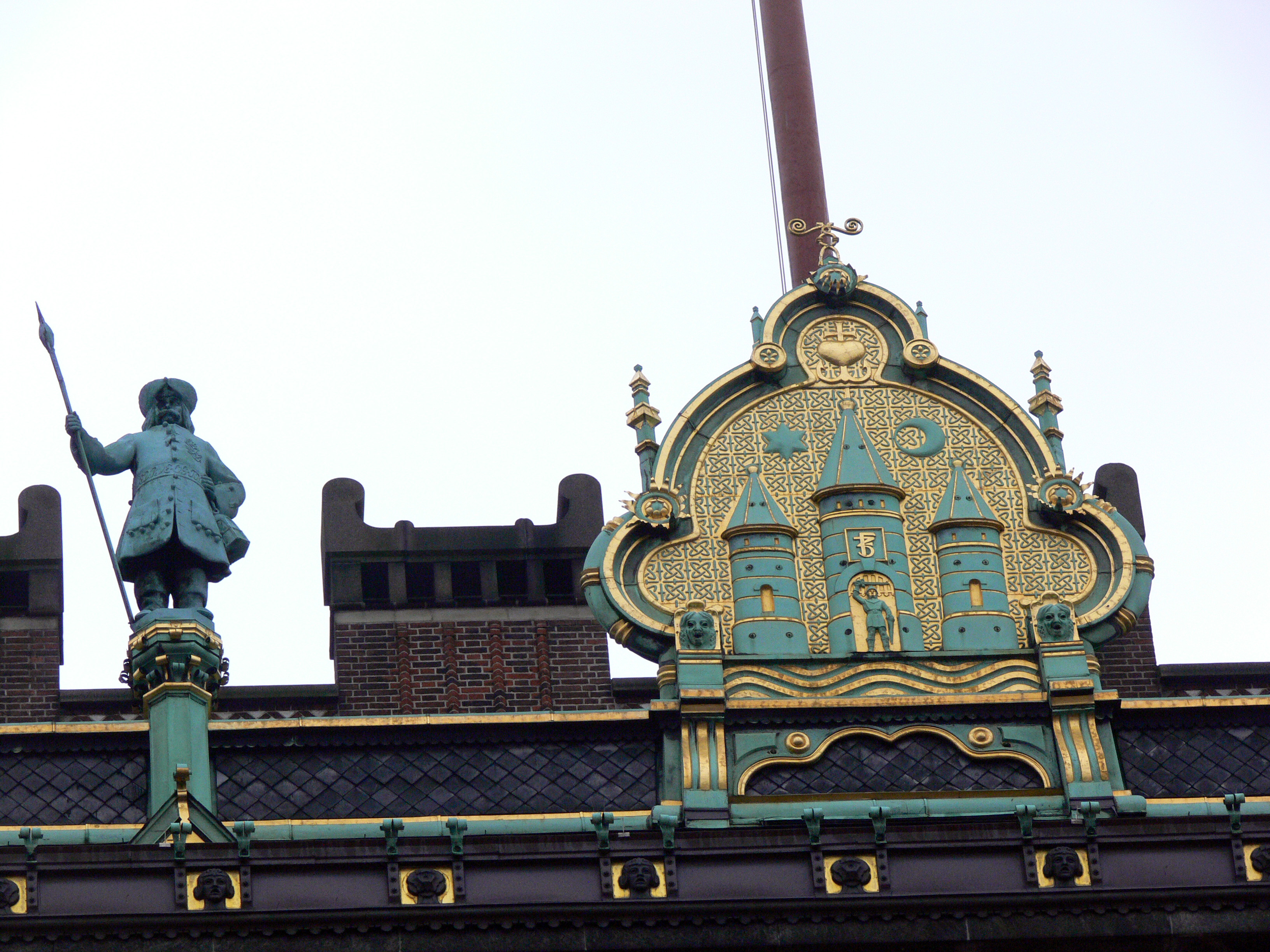 Rathaus in Kopenhagen